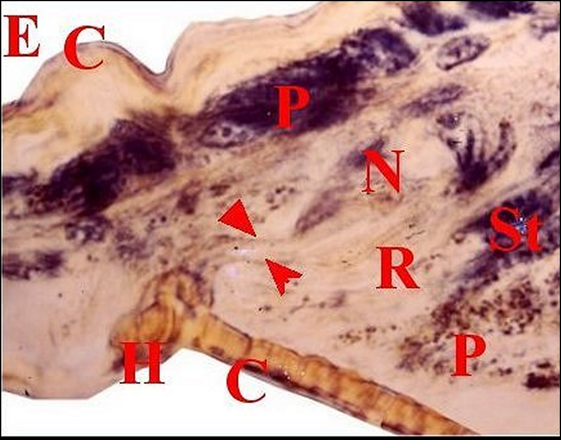 Glandules tégumentaires de l'épigastre de Meta menardi en coupe histologique